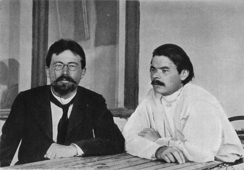 Aquí aparecen Antón Chéjov y Máximo Gorki en Yalta en 1900.